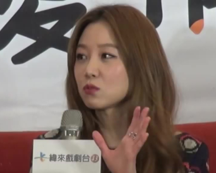 中文（台灣）: 宣傳新韓劇 孔孝真旋風訪臺